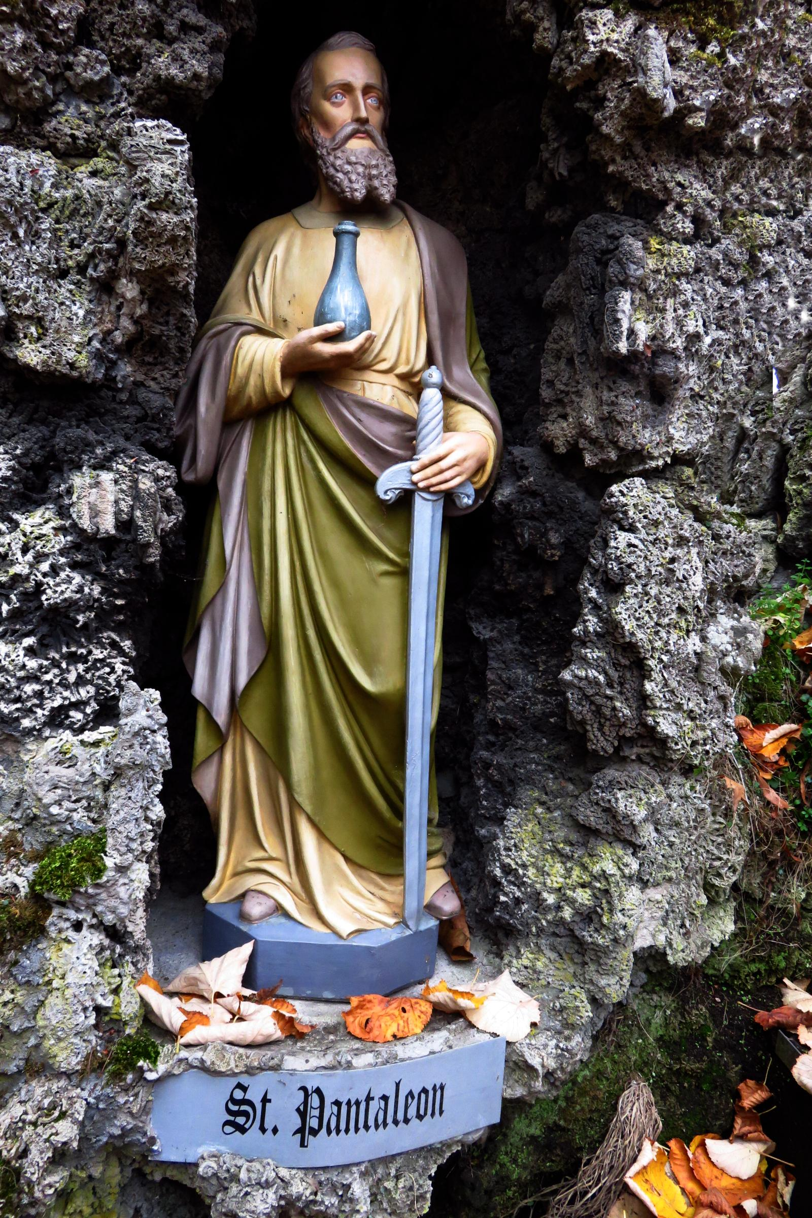 Grottenanlage in Hehn Heiligenpesch Christliche Figuren in Mönchengladbach